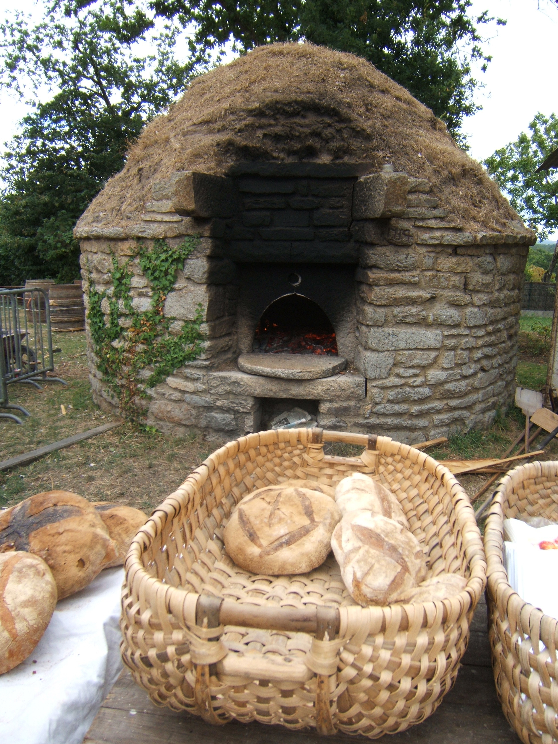 Le festival des vieux métiers à Lizio dans le Morbihan.